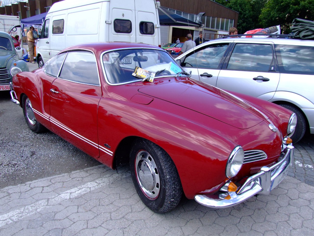 Quelle: selbst fotografiert, 07/2006 Fotograf: Späth Chr.